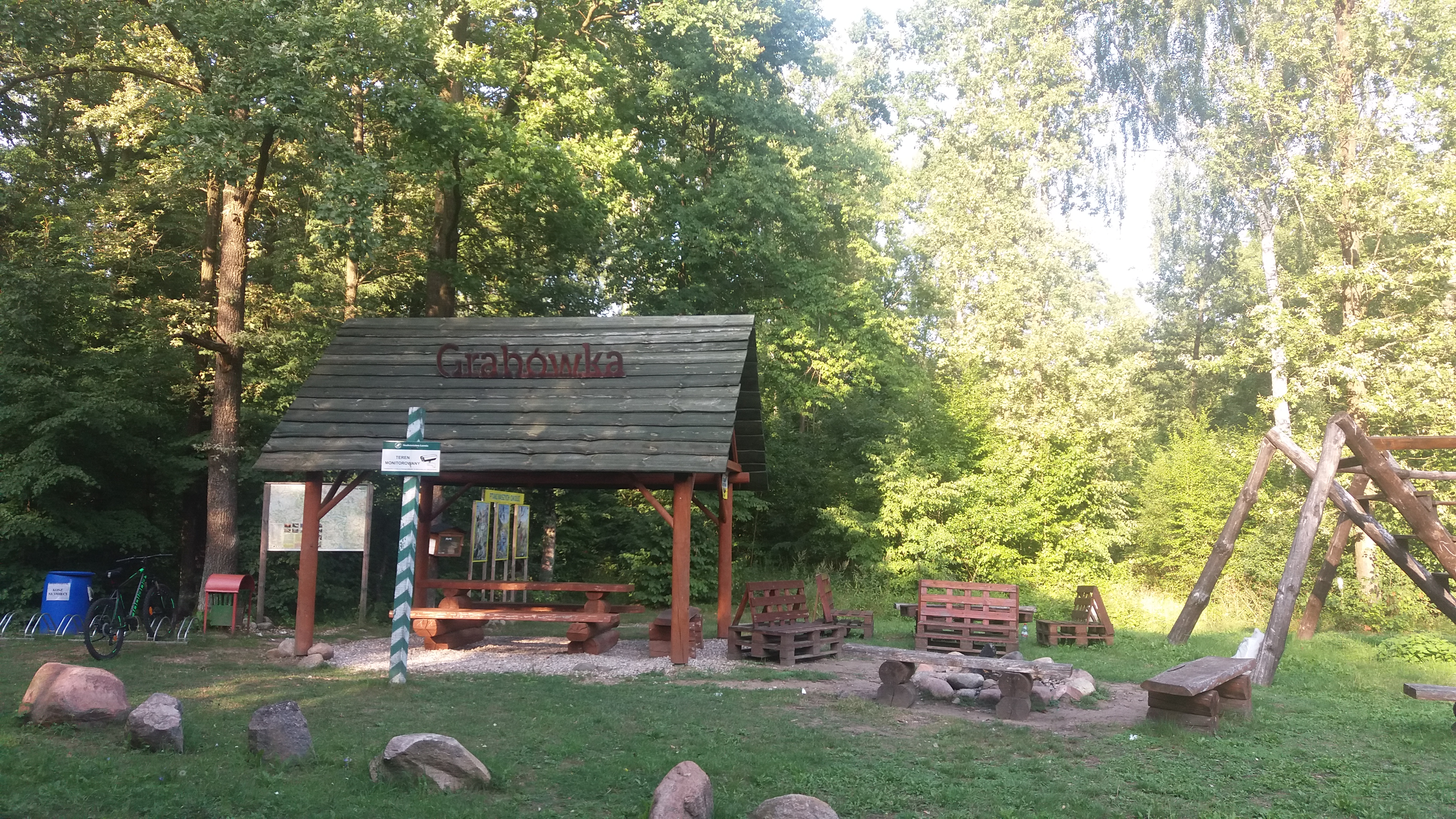 Polana w rezerwacie przyrody Grabówka